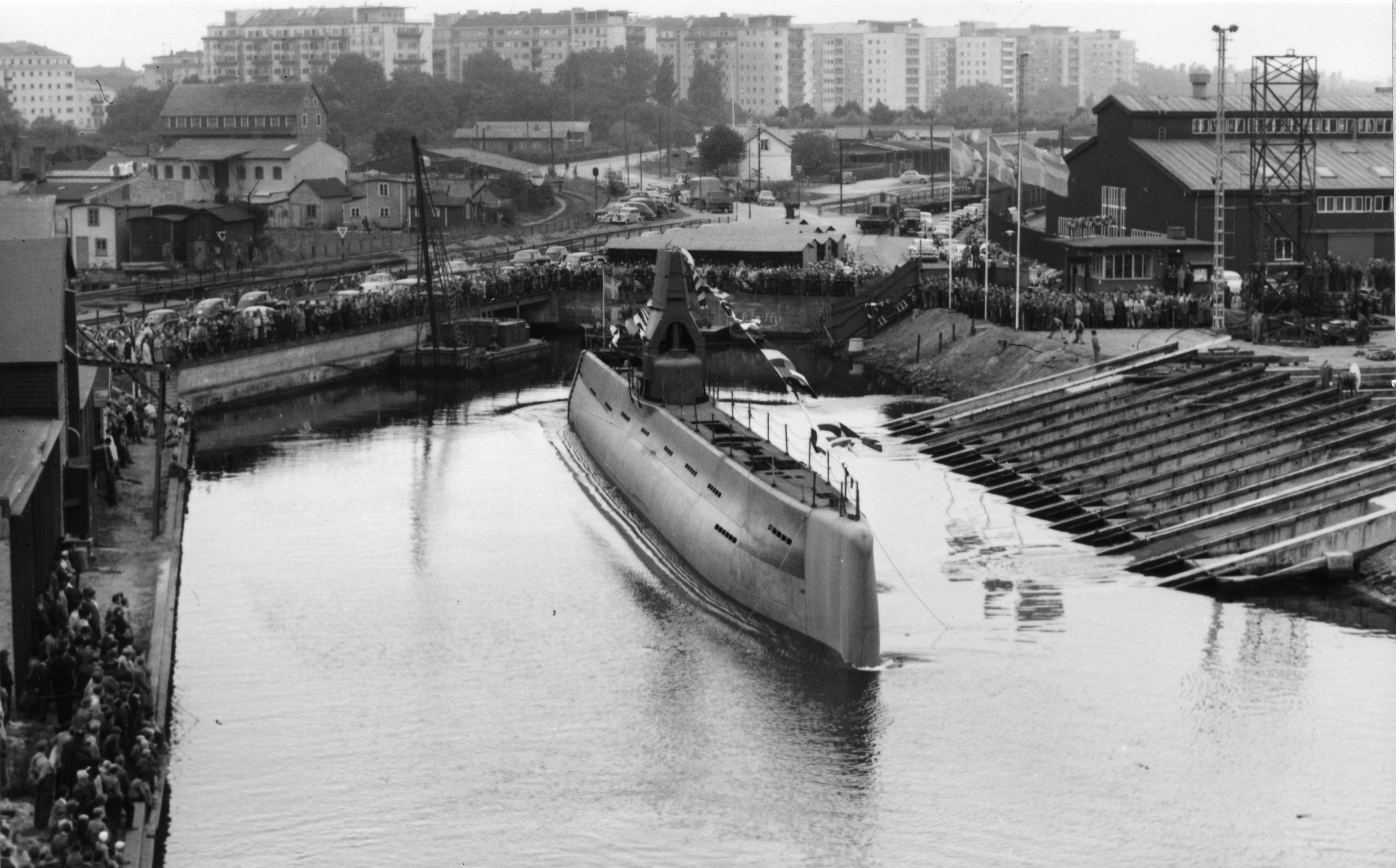 Den svenska ubåten HMS Sälen sjösätts vid Kockums Mekaniska Verkstad i Malmö.